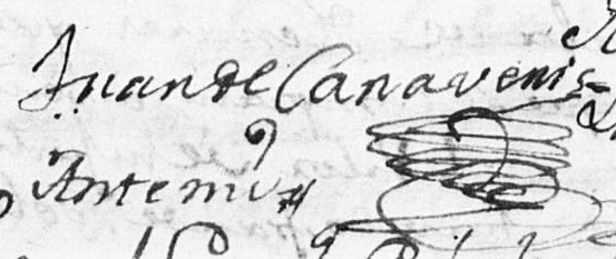 firma de Juan Canaveris (1748-1822) funcionario colonial español de origen piamontés. También utilizó otras variantes de su apellido.